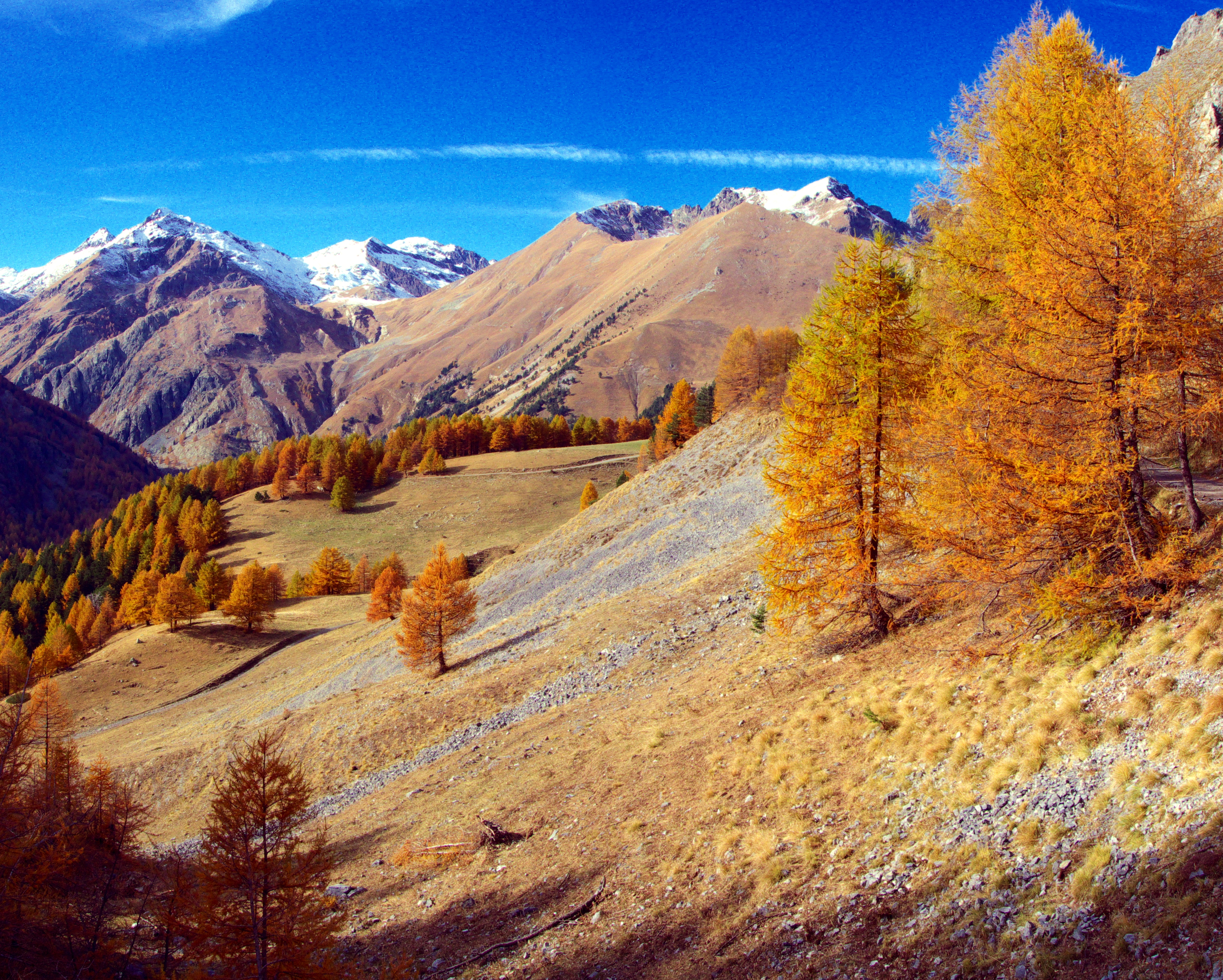 Vallée de la Roya